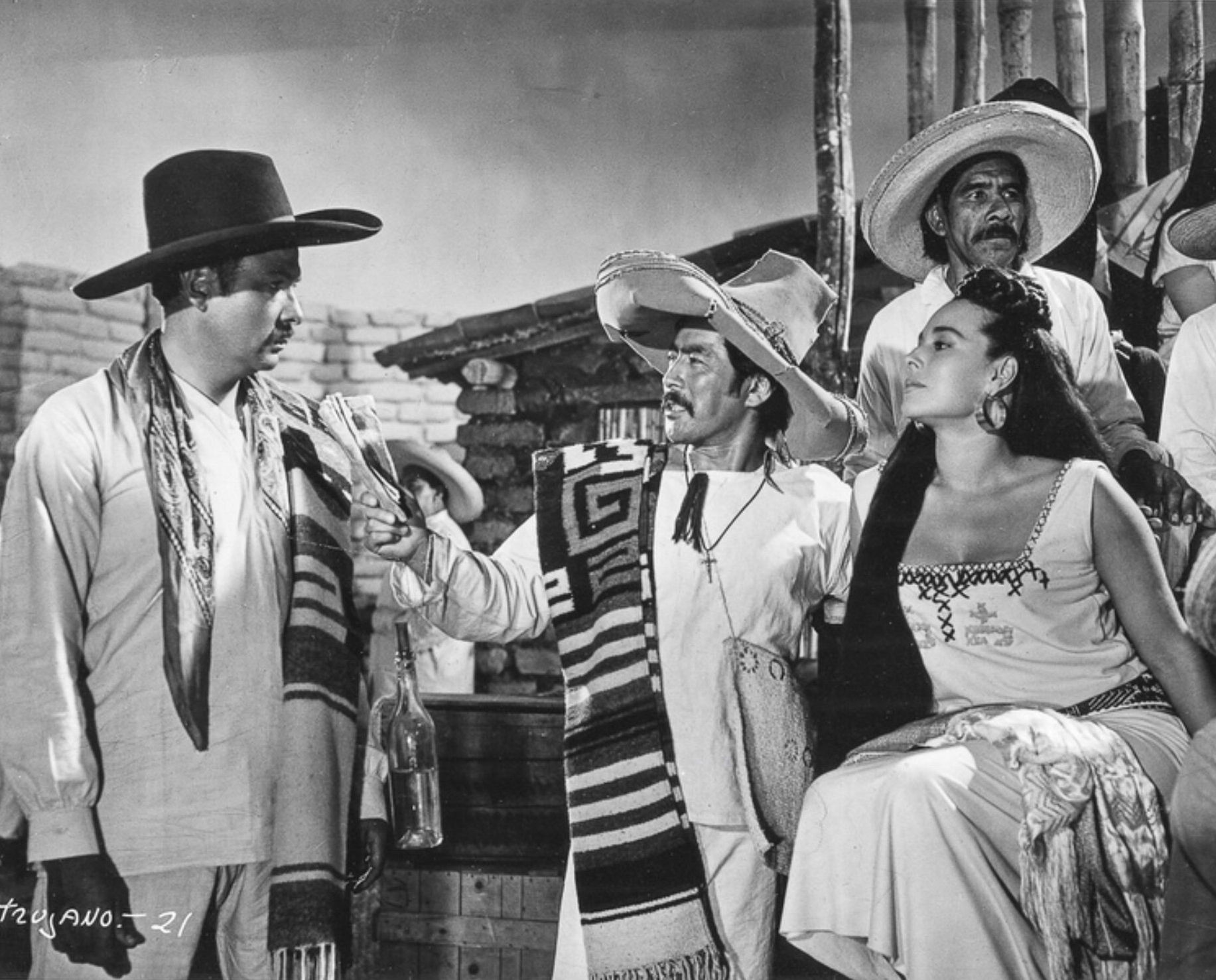 Fotografía de la película Ánimas Trujano